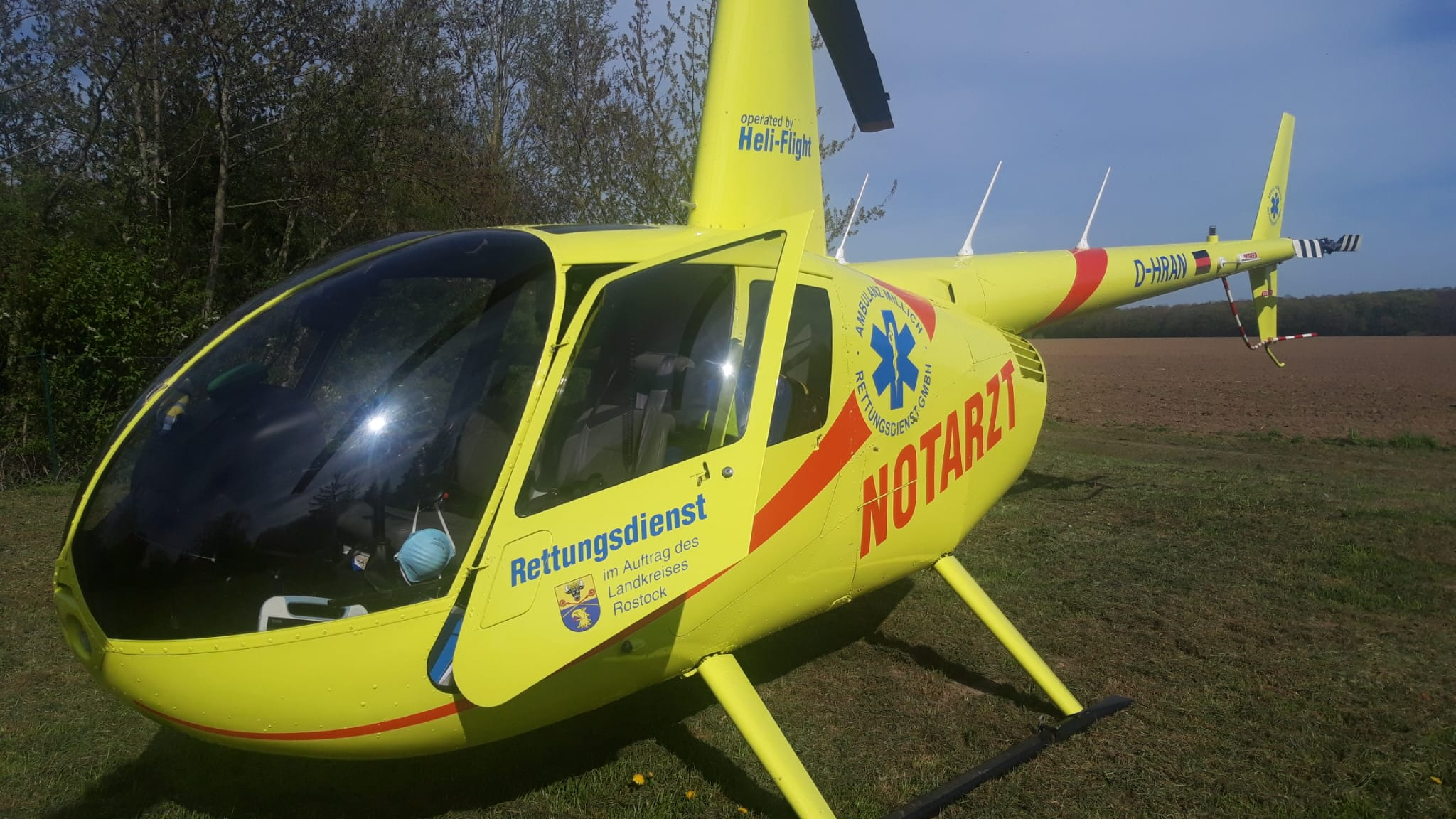 Die Einsatzmaschine des NEH vom Typ Robinson R44 Raven mit der Kennung D-HRAN am Einsatzort in Lambrechtshagen.